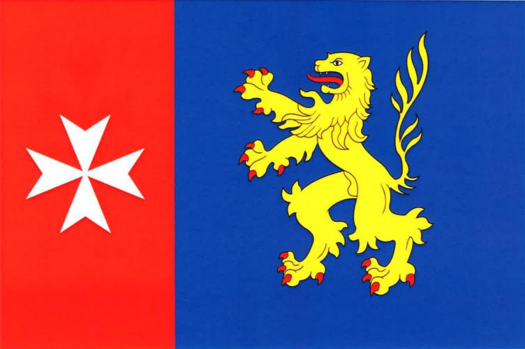 Sezemice, okres Mladá Boleslav, vlajka